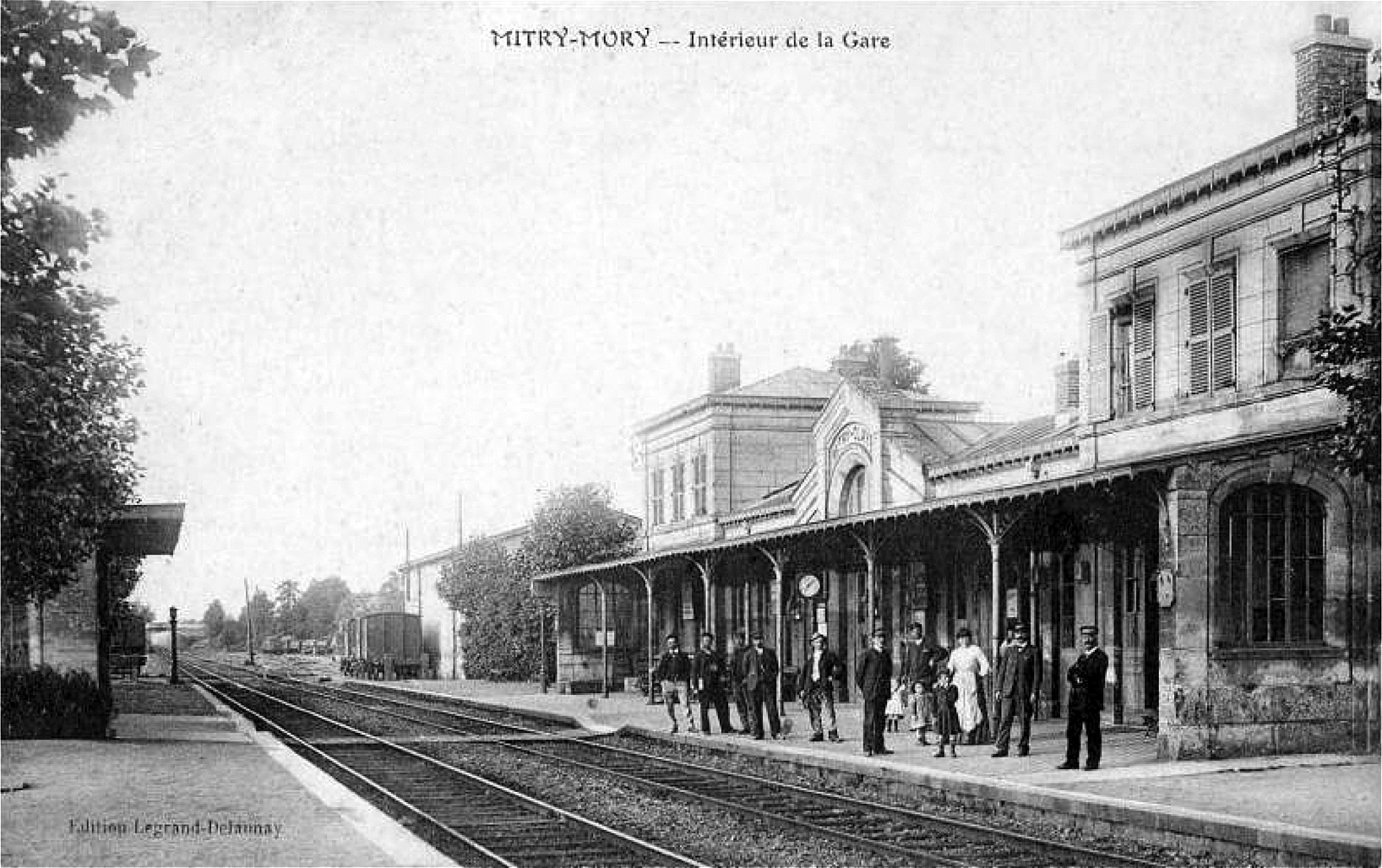 Intérieur de la gare de Mitry-Mory au début des années 1900.